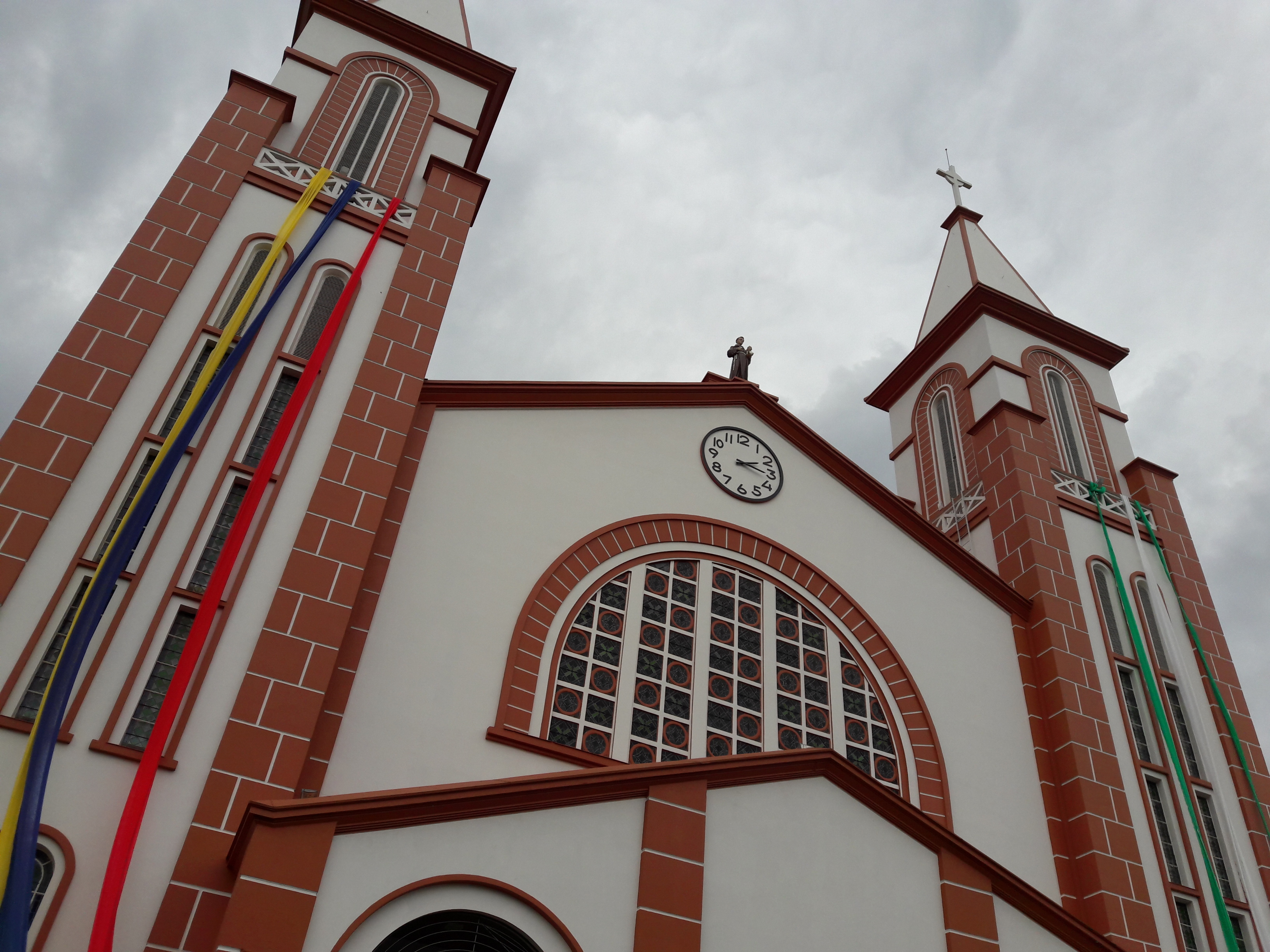 Igreja Matriz de Chapecó, enfeitada para a final da Recopa Sul-Americana.